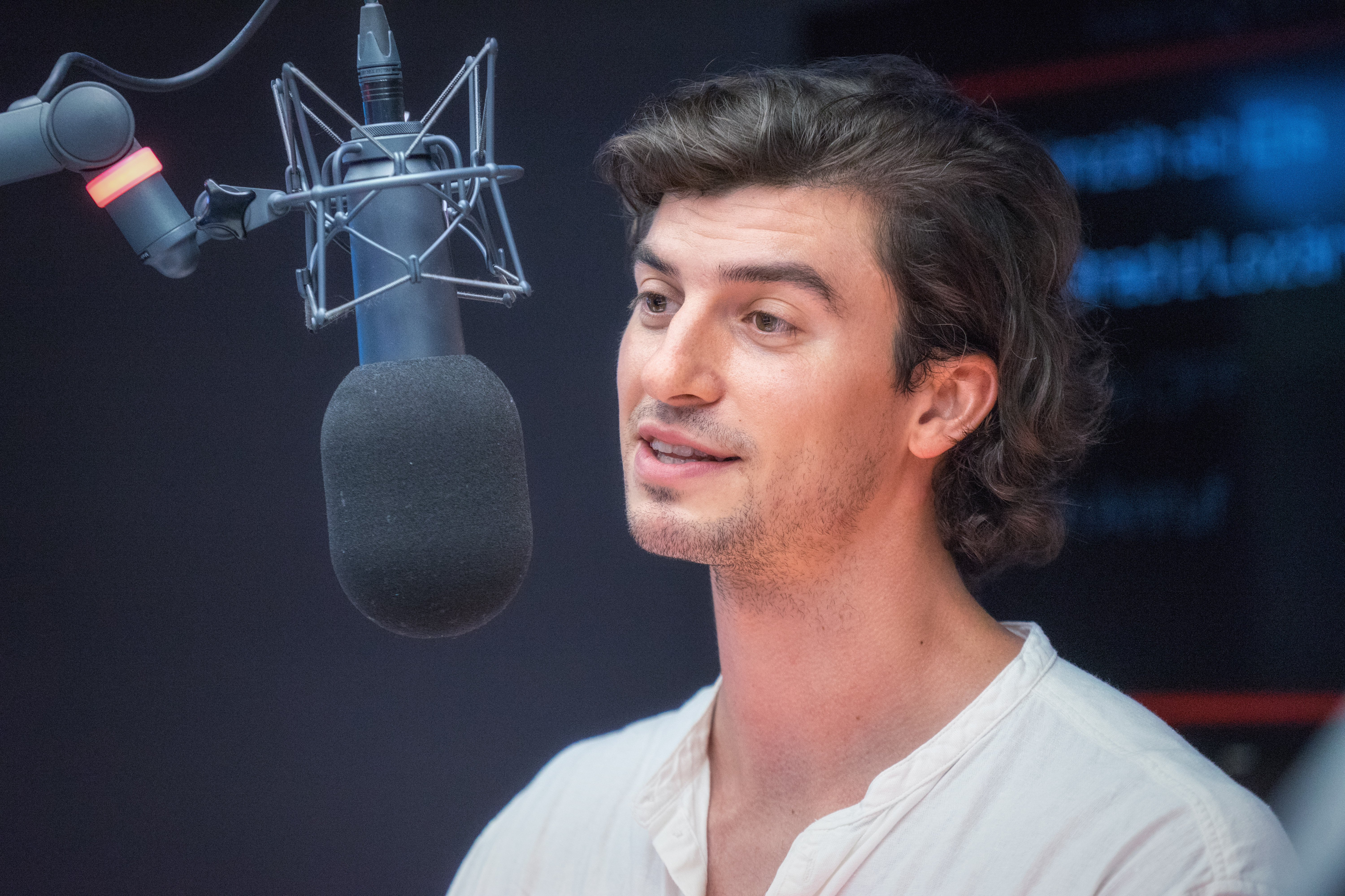 Jan Oliver Bühlmann bei Radio Pilatus (2018)